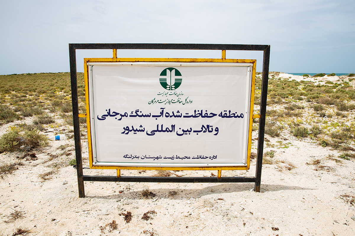 تابلوی منطقه حفاظت‌شده شیدور